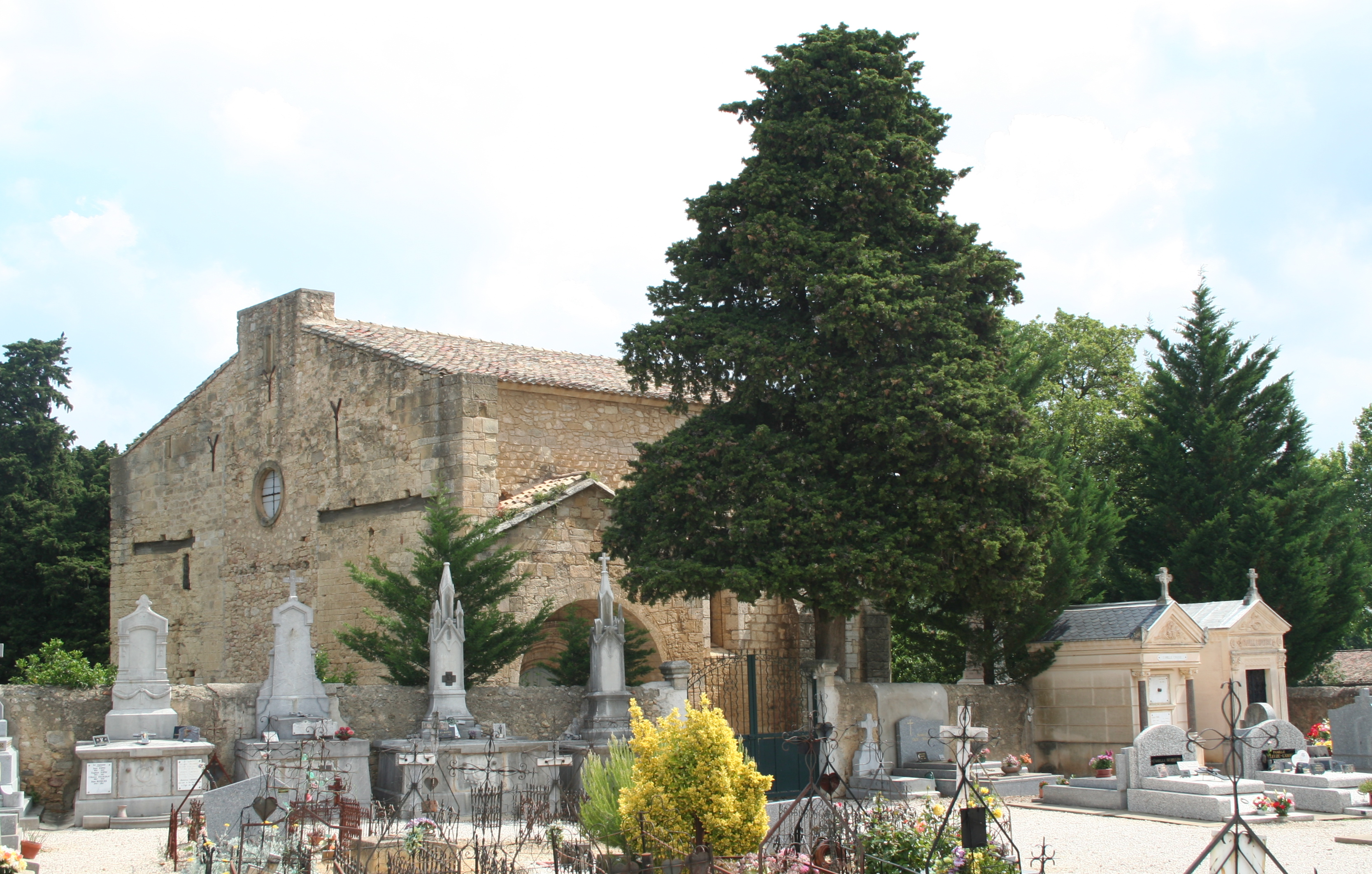 Espondeilhan (Hérault) - Église romane Notre-Dame des Pins.